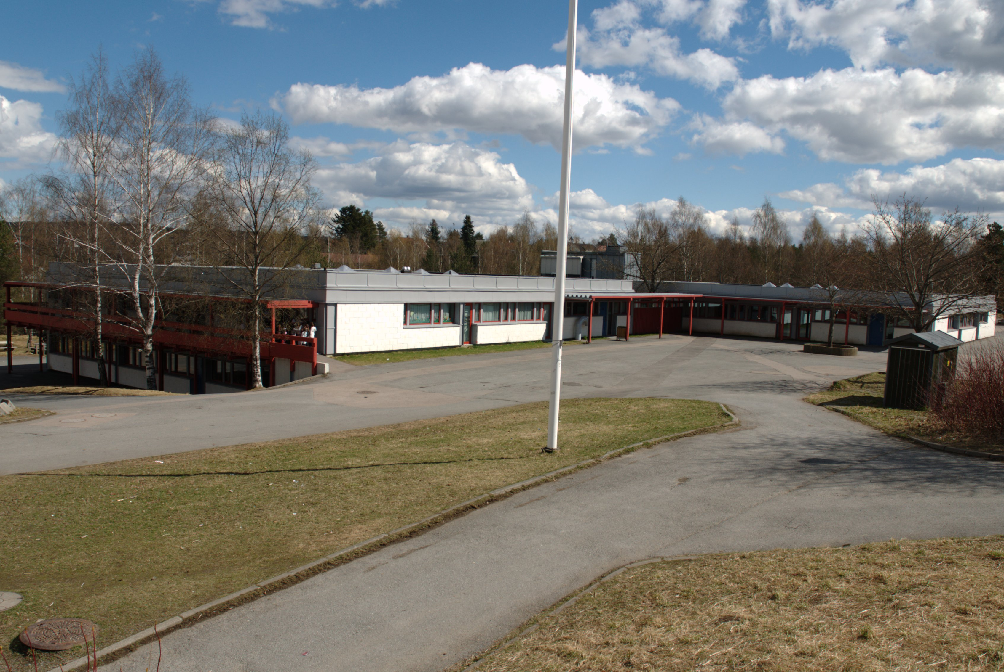 Haugen skole er en Barne- og ungdomsskole på Stovner like ved Høybråten i Oslo.